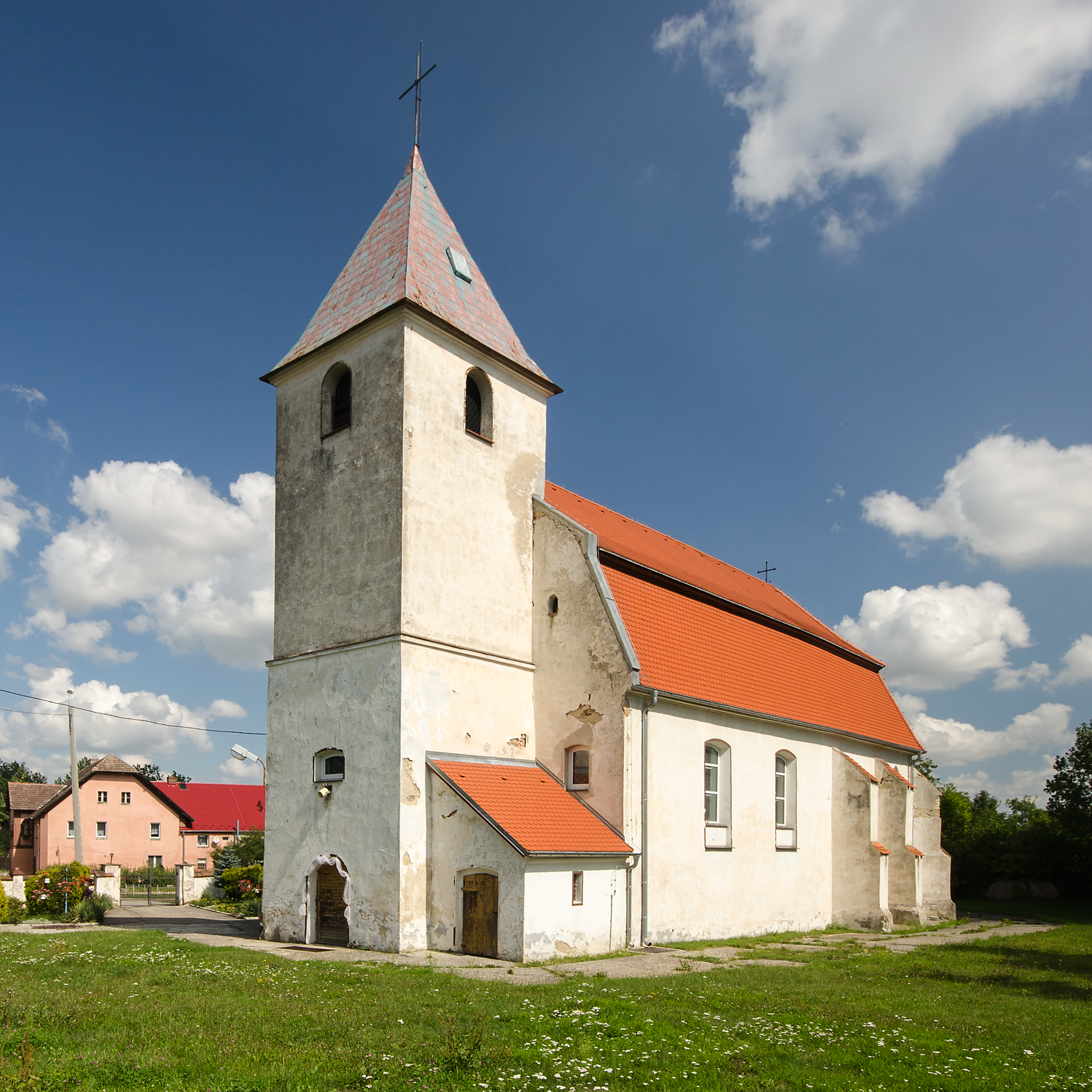 Gnojna, kościół par. p.w. Matki Boskiej Różańcowej, XV/XVI, XVIII